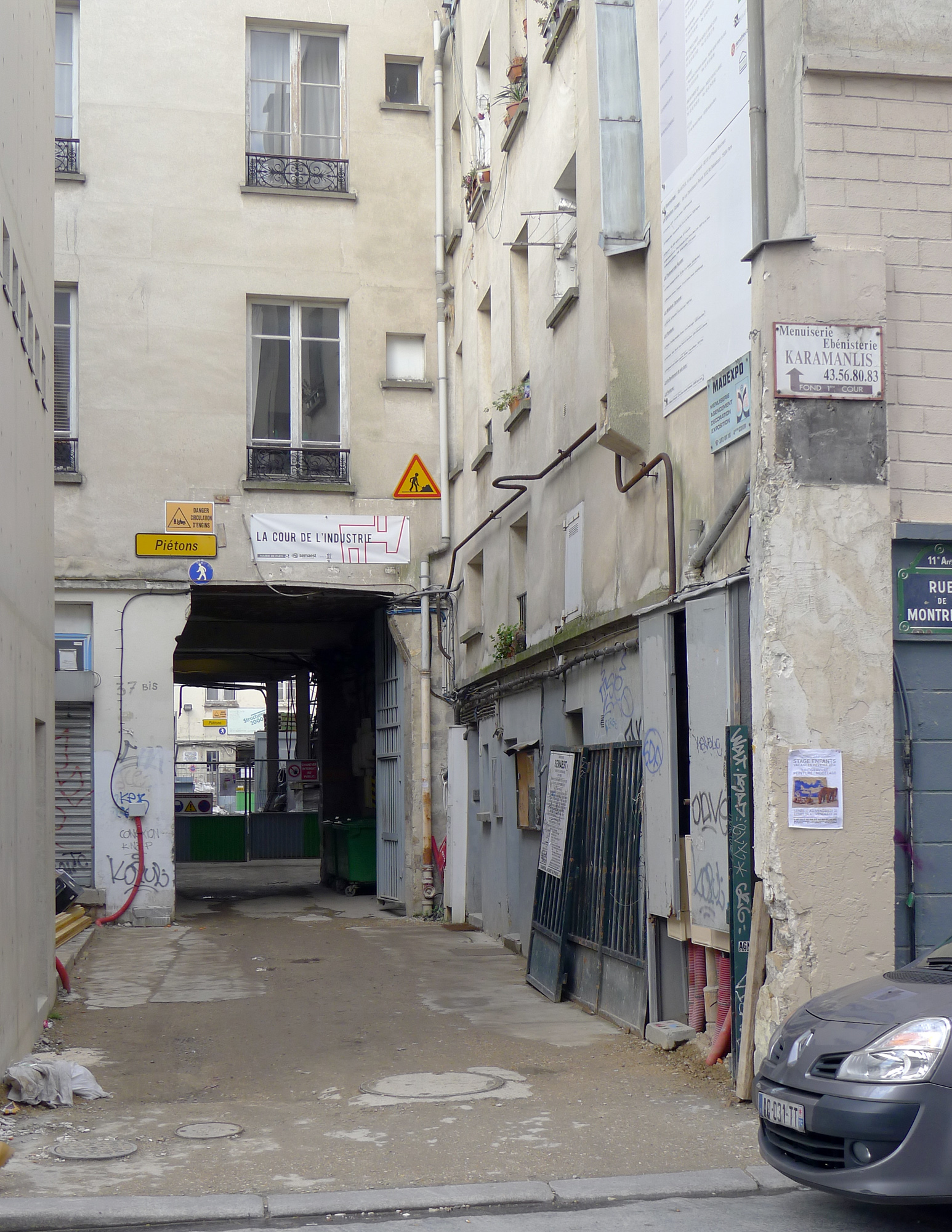 Cour de l'industrie, 37 bis rue de Montreuil - Paris XI .